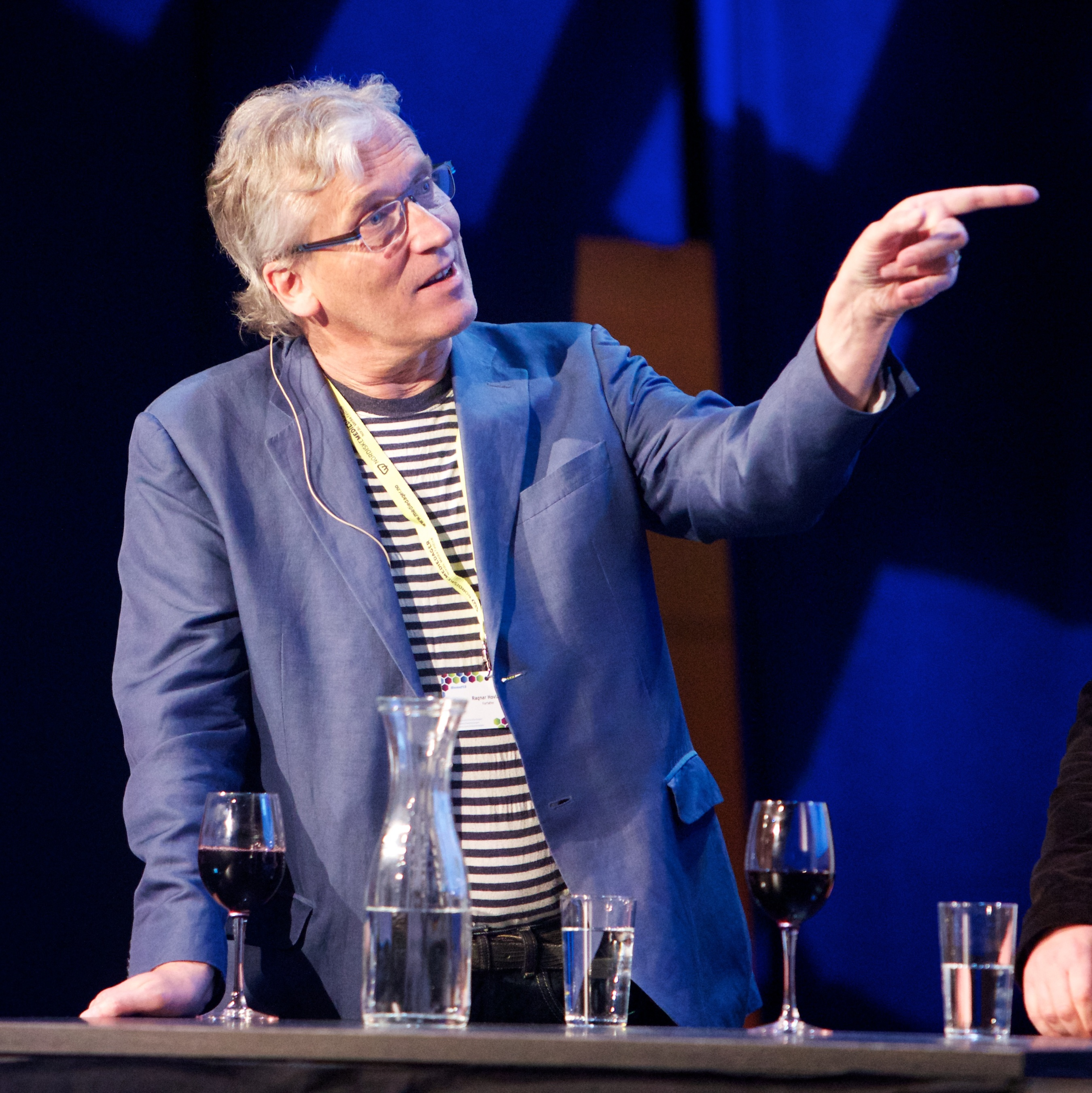 Nordiske Mediedager 2013